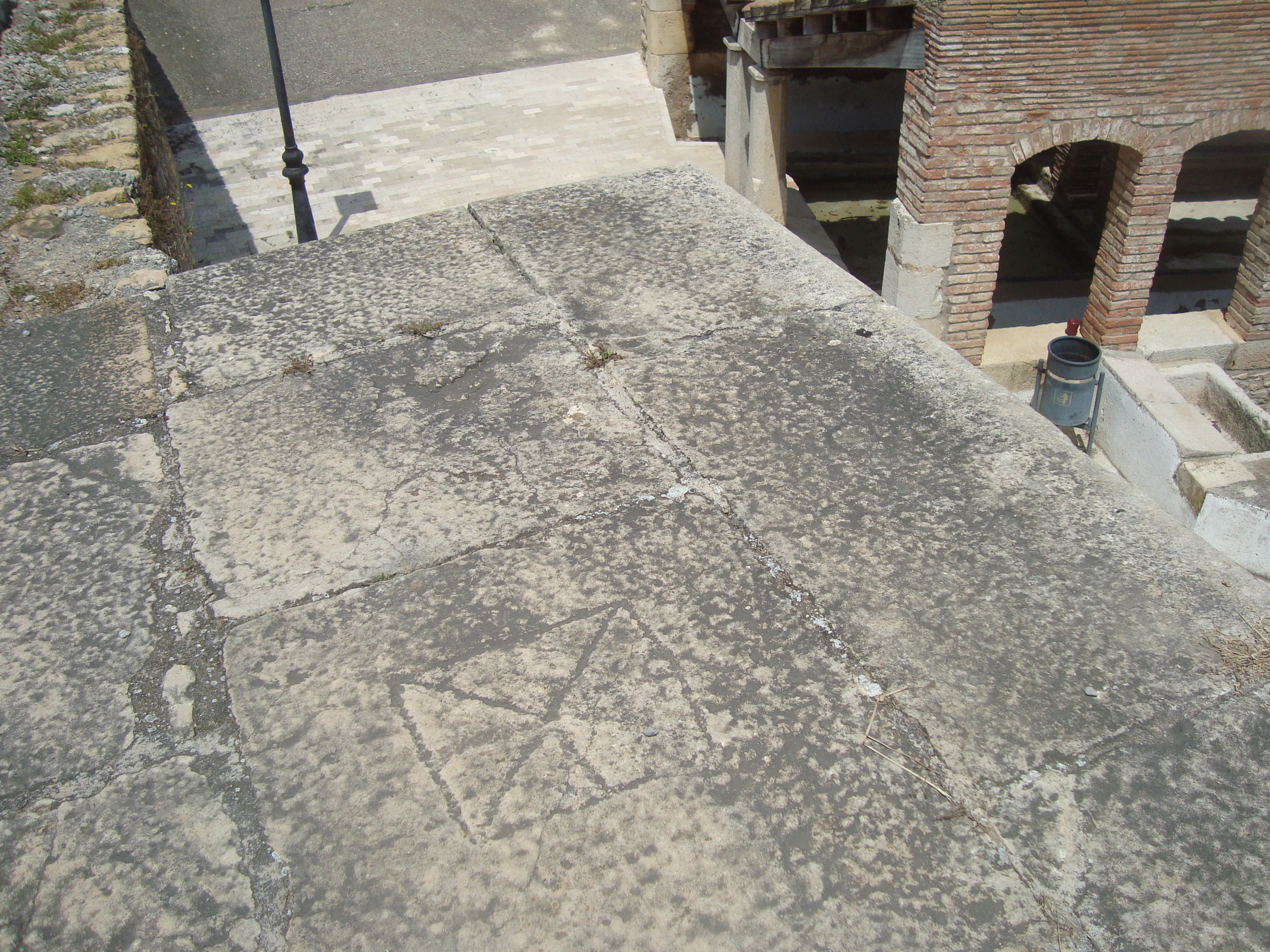 Tablero de juego grabado sobre una losa de piedra (La Jana, Castellón). La cronología que se baraja para este grabado se situaria entre los siglos XVIII-XIX.